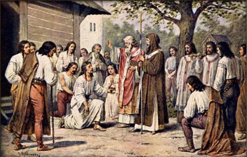 Josef Mathauser - Konstantin a Metoděj přišli na Velehrad